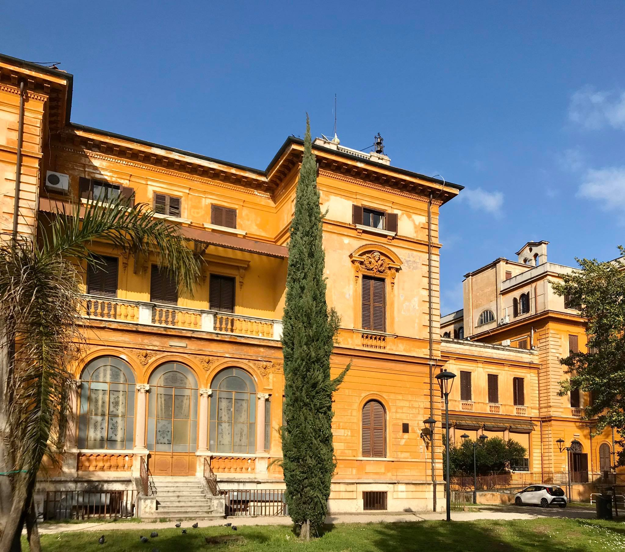 Vista generale di villa Mirafiori a Roma